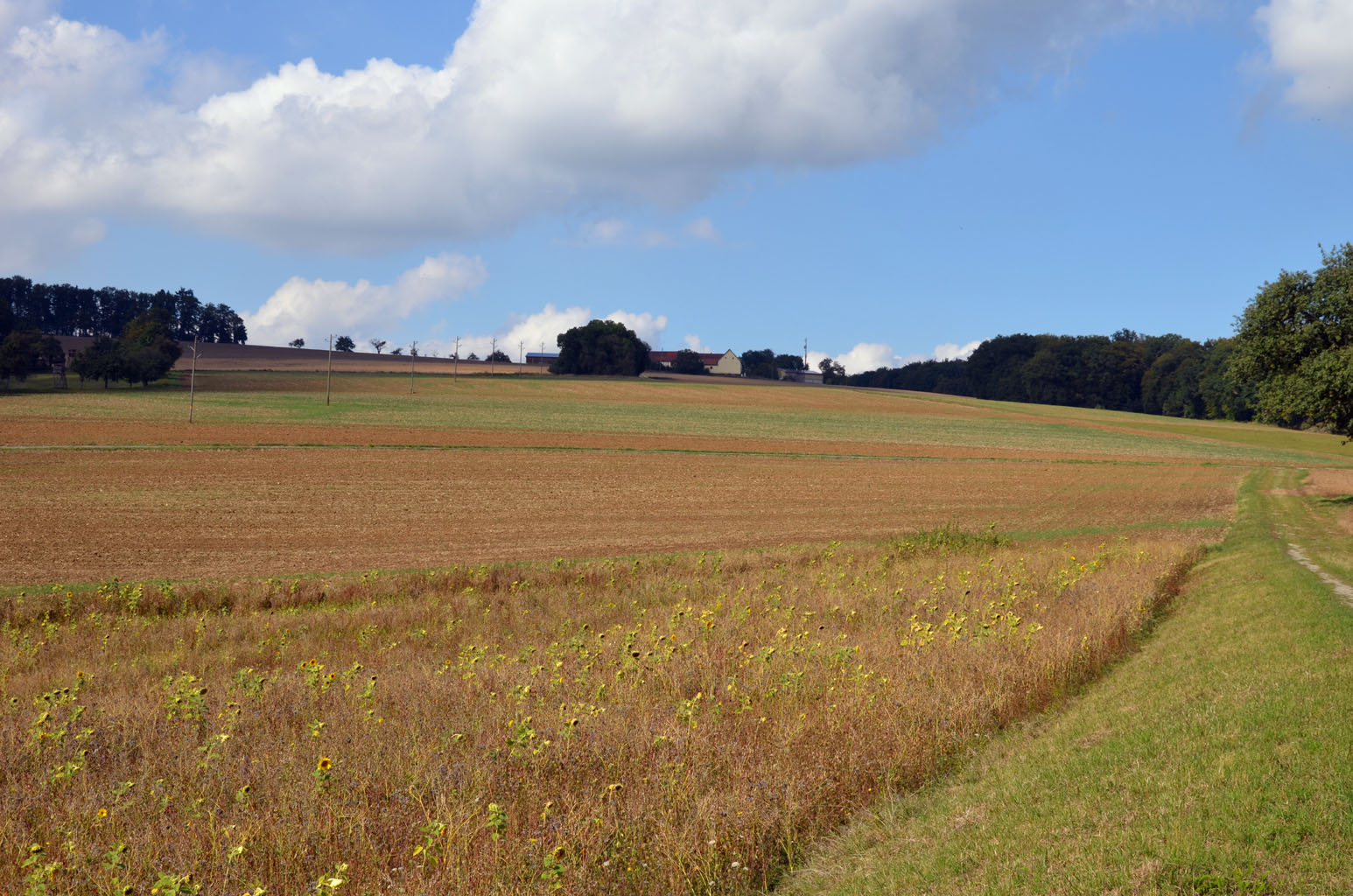 Der Finkenhof auf dem Karlsberg, von Süd-Südost gesehen.